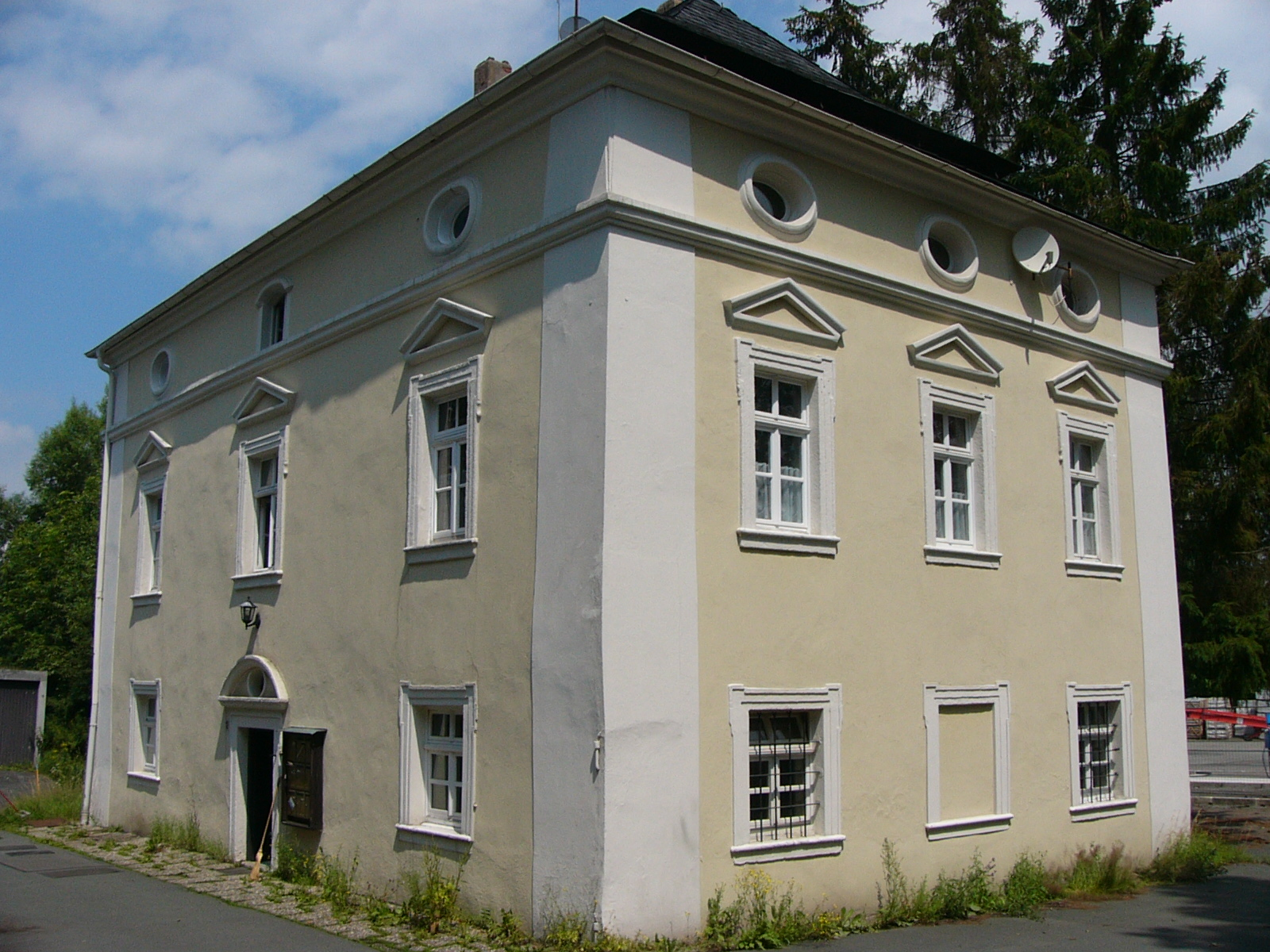 Stelzenhof, Hof